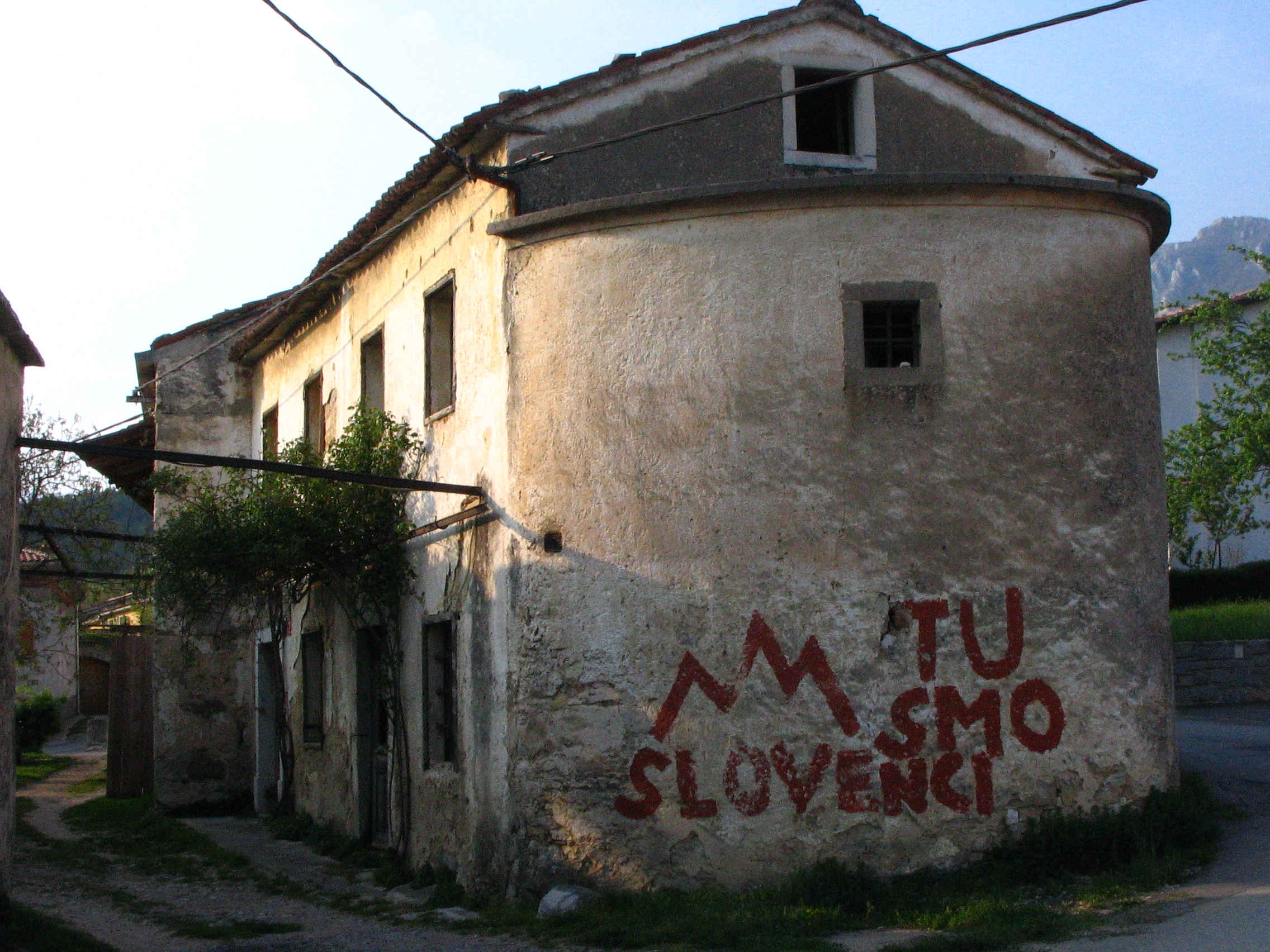 Središče Dolge Poljane